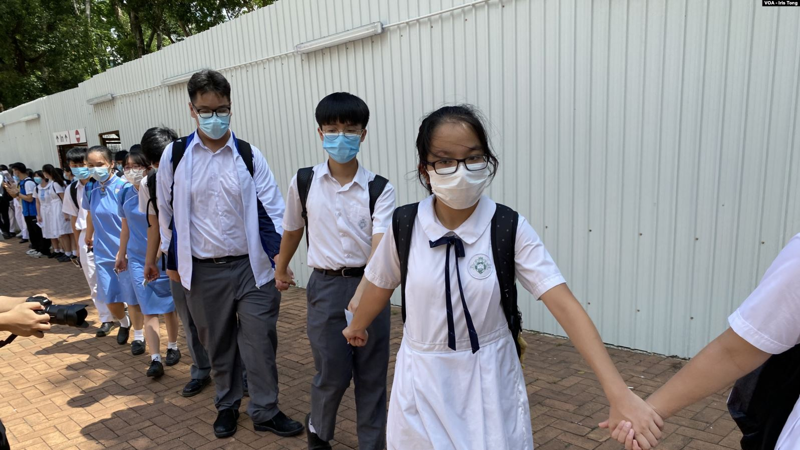 香岛中学及附近多间中学约100名学生6月12日组成人链声援一名不获校方续约的音乐老师